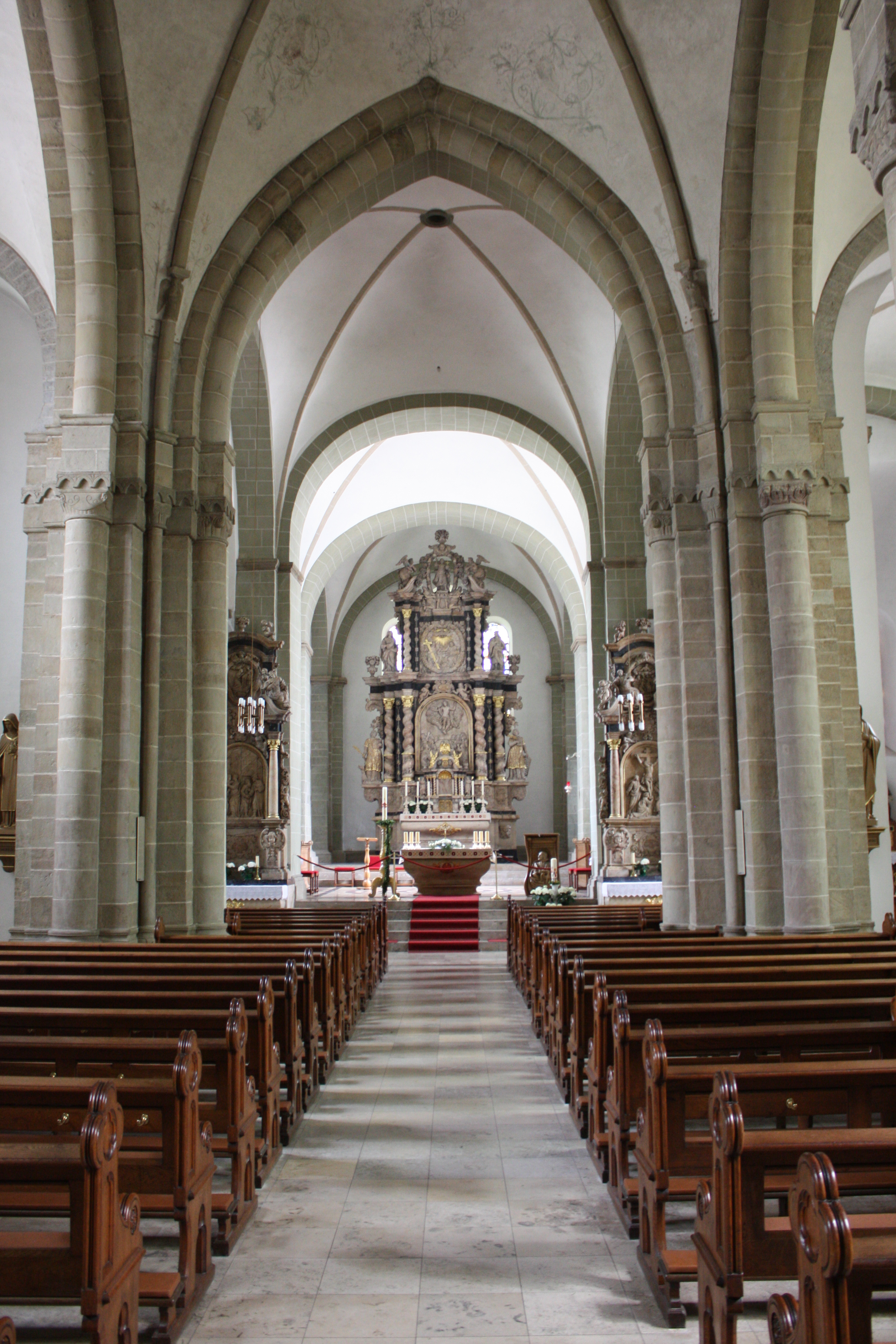 Chorraum von St. Cyriakus Geseke